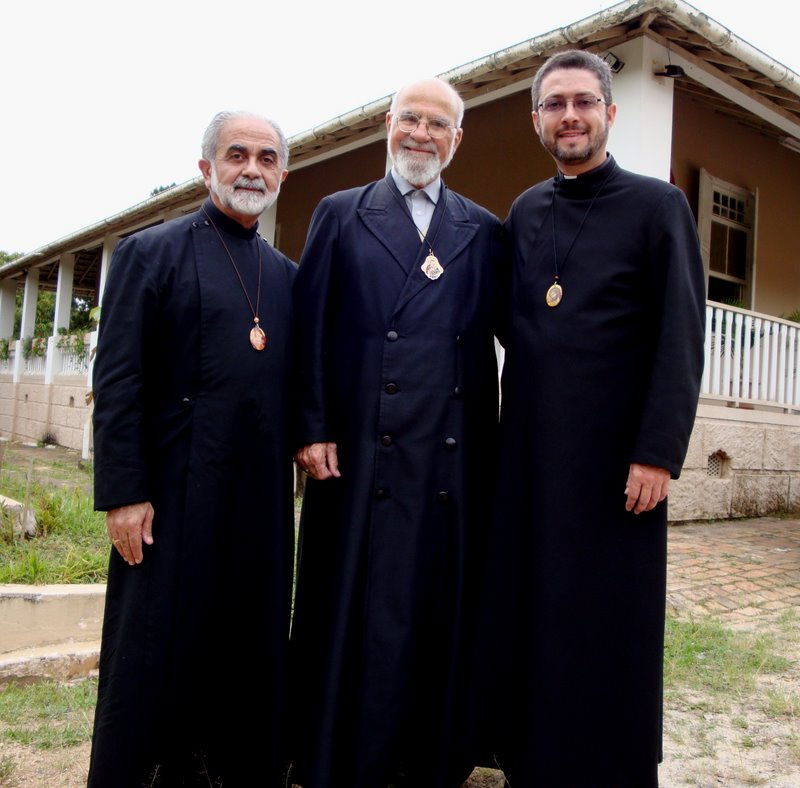 D. Spiridon entre D. Farès e Arquimandrita Theodoro